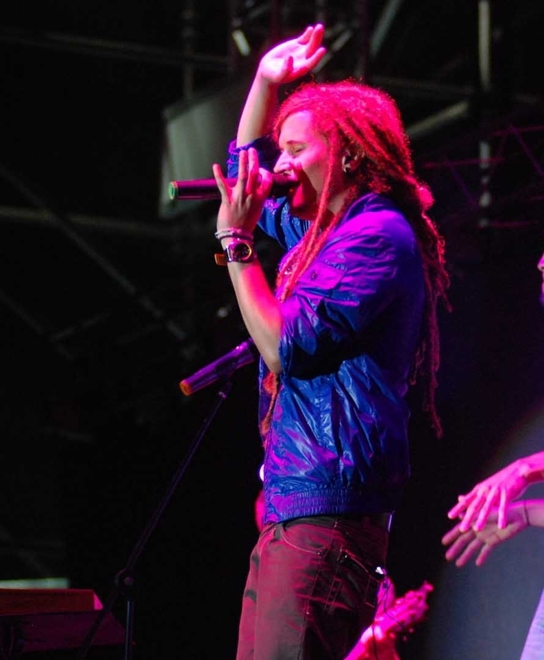 Vicente García, músico.